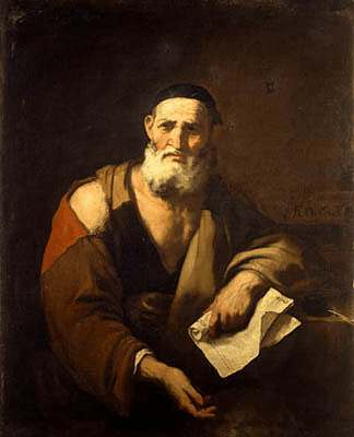 Leukipp, Idealportrait